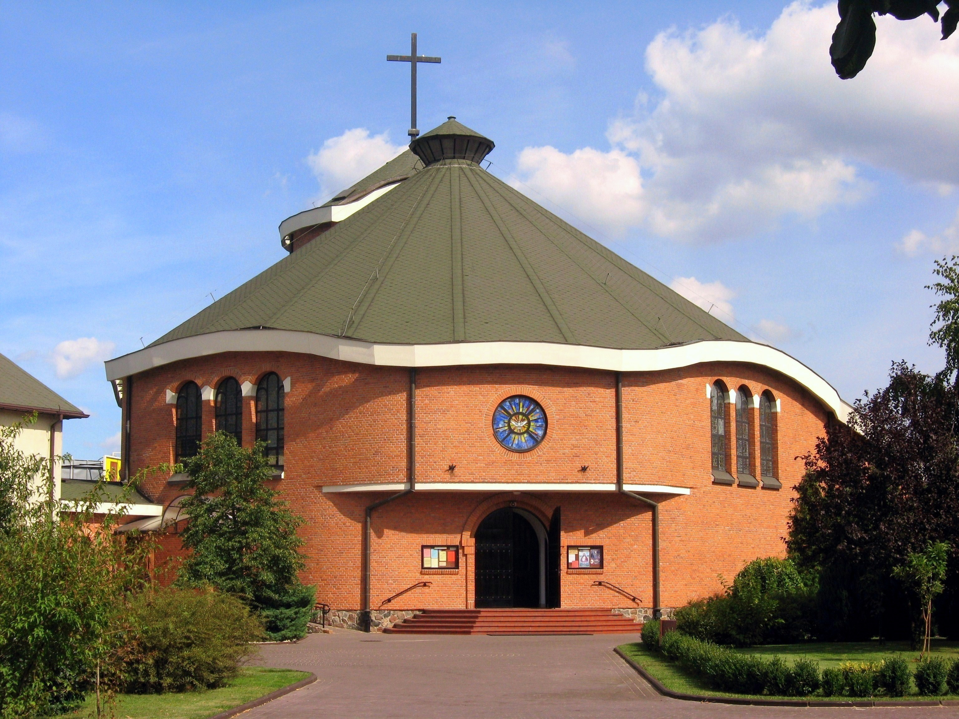 Kościół pw. Marka Ewangelisty na warszawskim Targówku